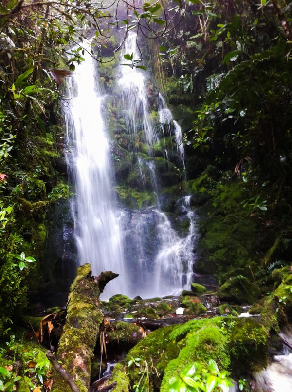 Cascadas en paramos de Colombia.